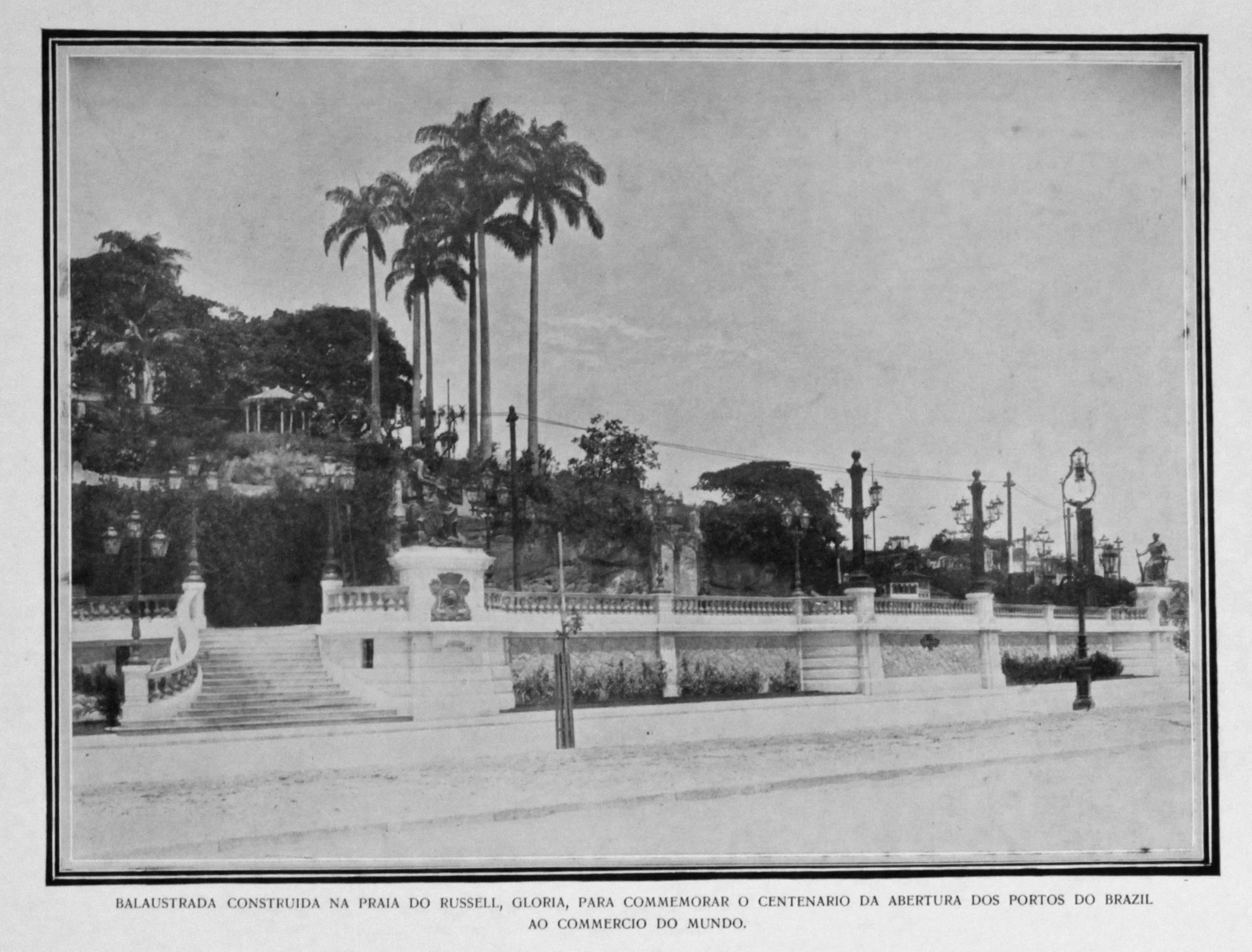 Balaustrada construída na Praia do Russell, Glória, para comemorar o Centenário da Abertura dos Portos do Brasil ao Comércio do Mundo em 28 de janeiro de 1908..